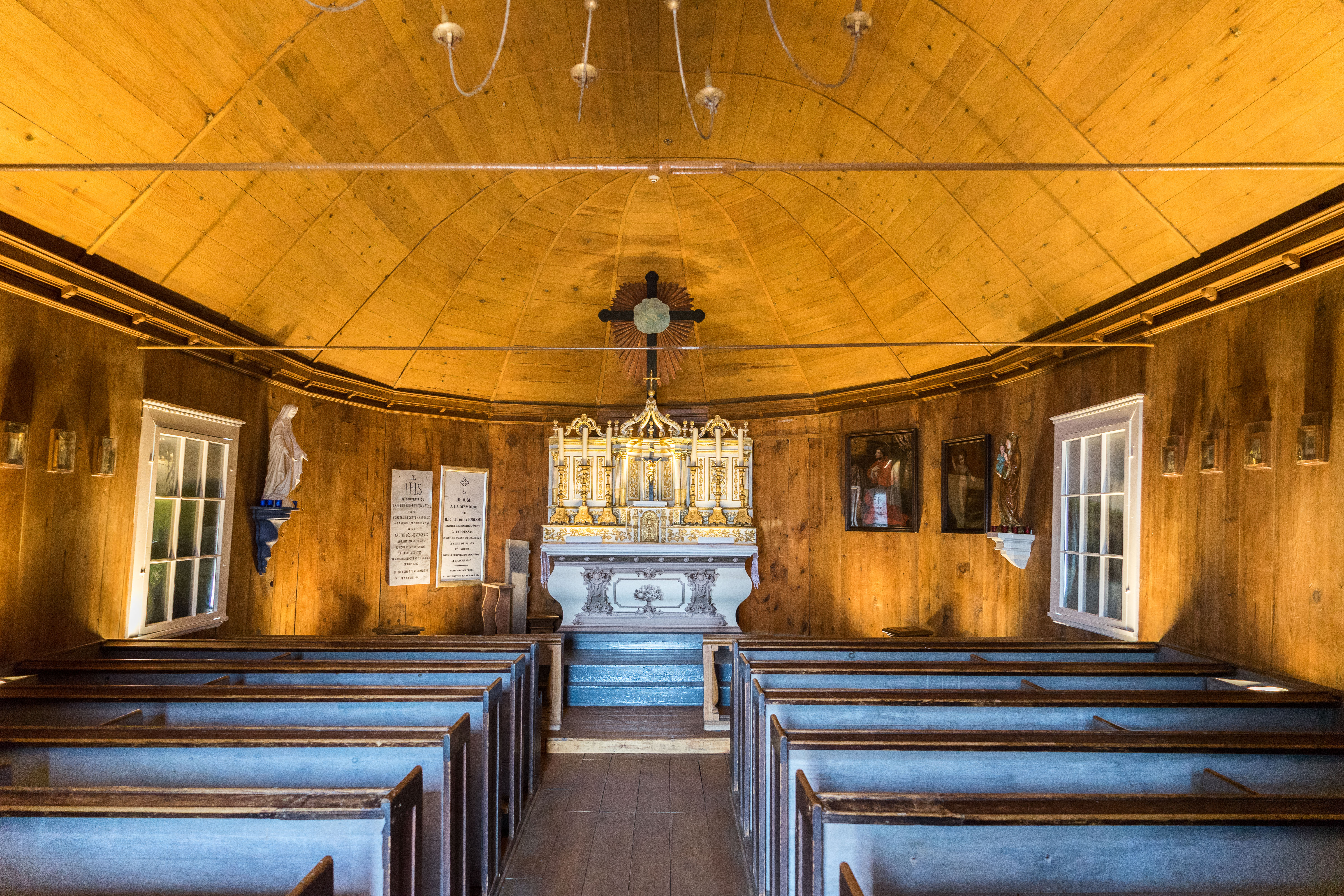 Quebec - Tadoussac - Chapelle - Intérieur